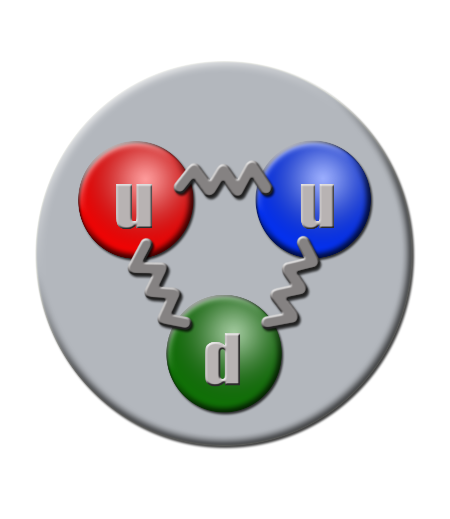 Estructura de Quarks de un Protón